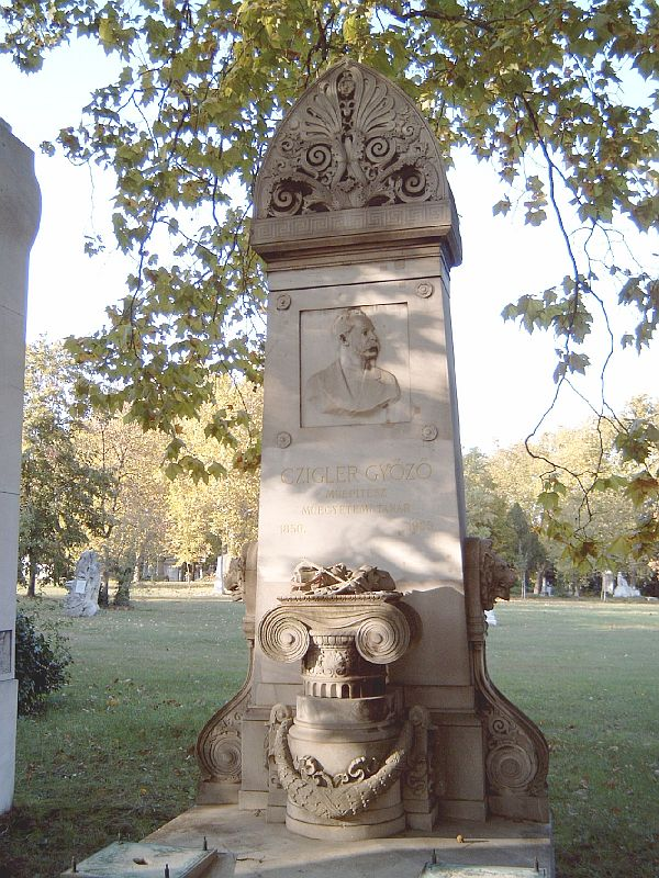 Czigler Győző sírja Budapesten. Kerepesi temető: 28-ds.-10. Szobrász: Dvorák Ede